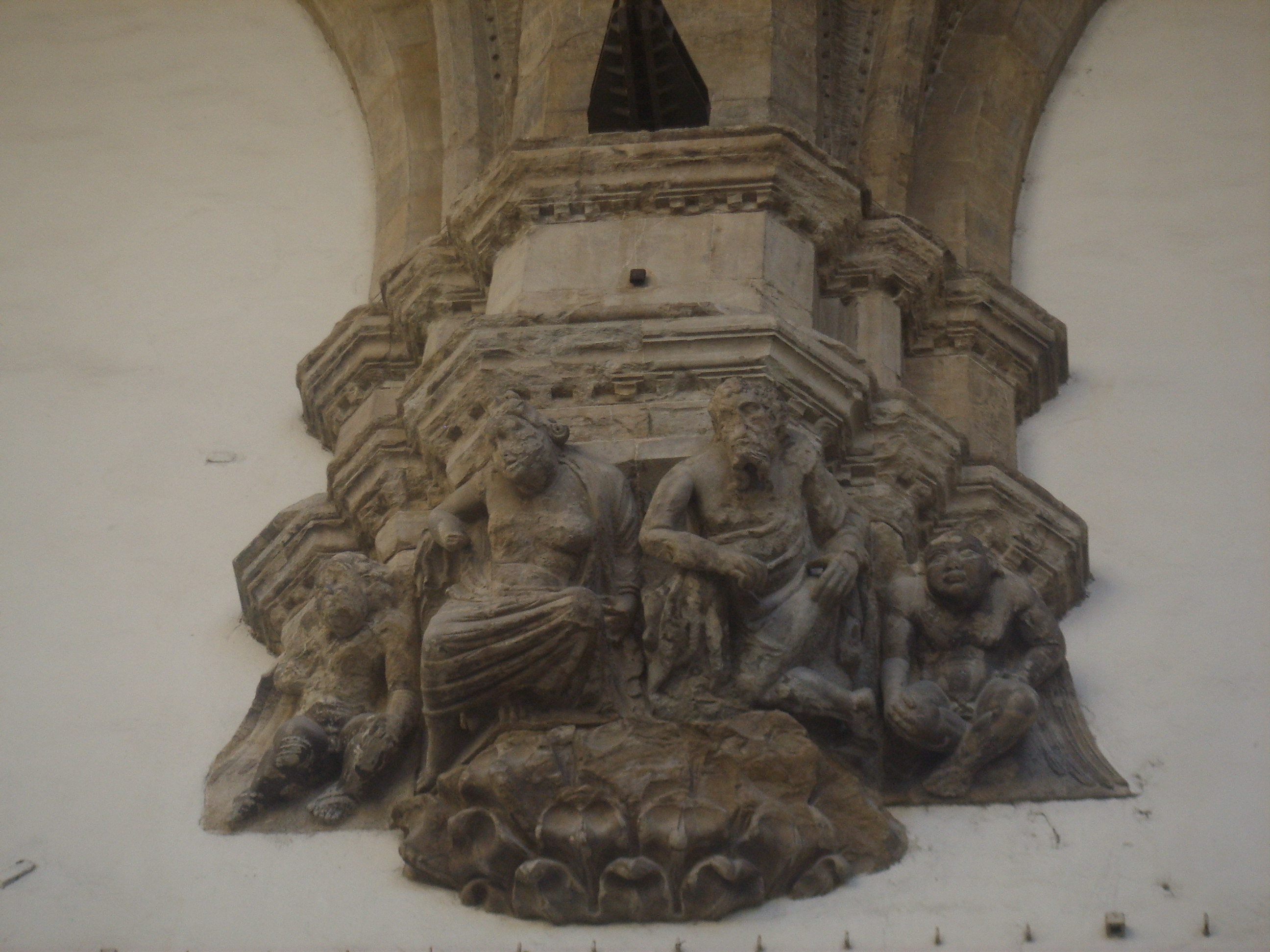 Loggia dei Lanzi or Loggia della Signoria in Florence, italy